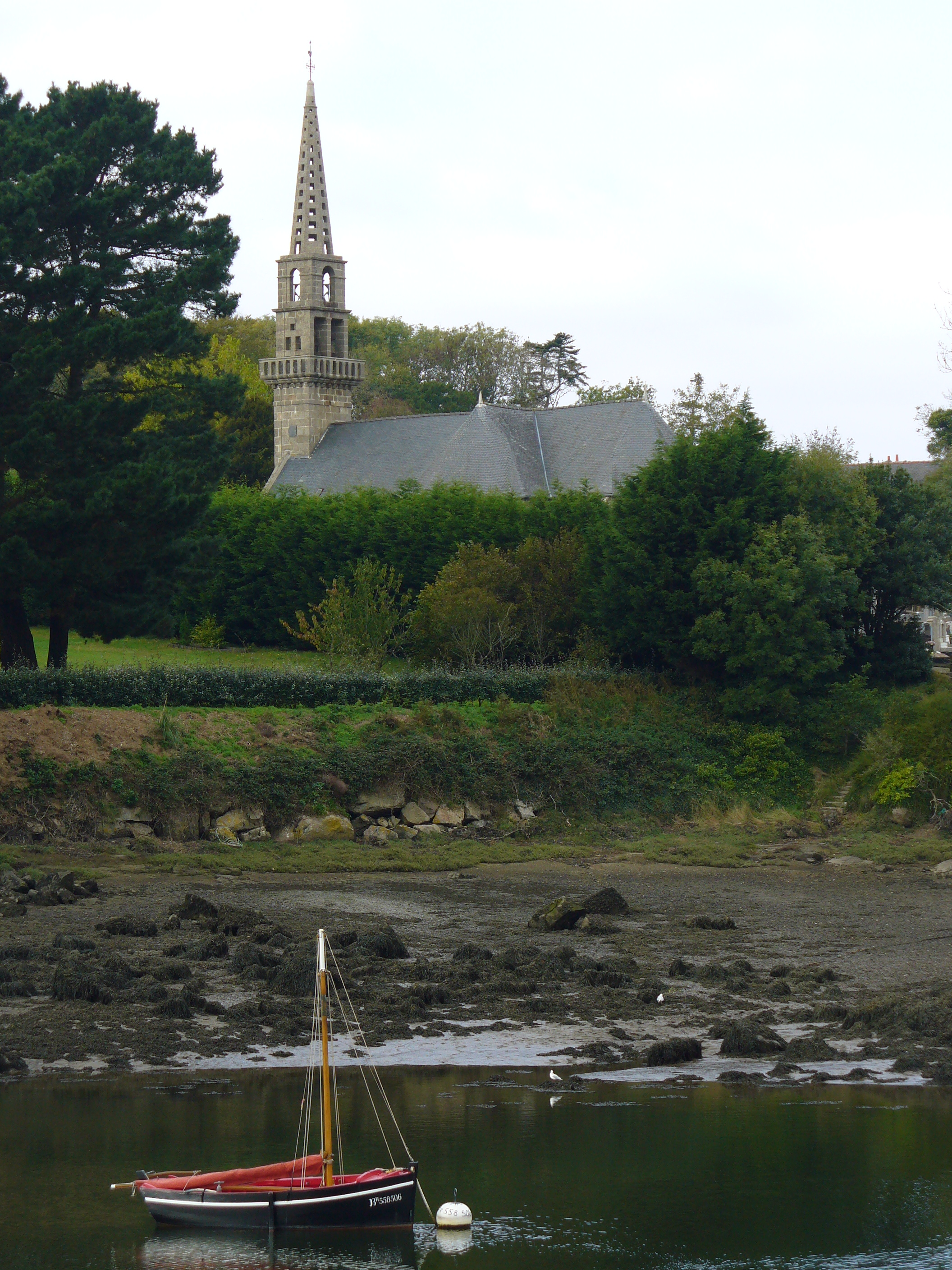 Eglise de Lanildut vue du chemin côtier de Plouarzel (29)